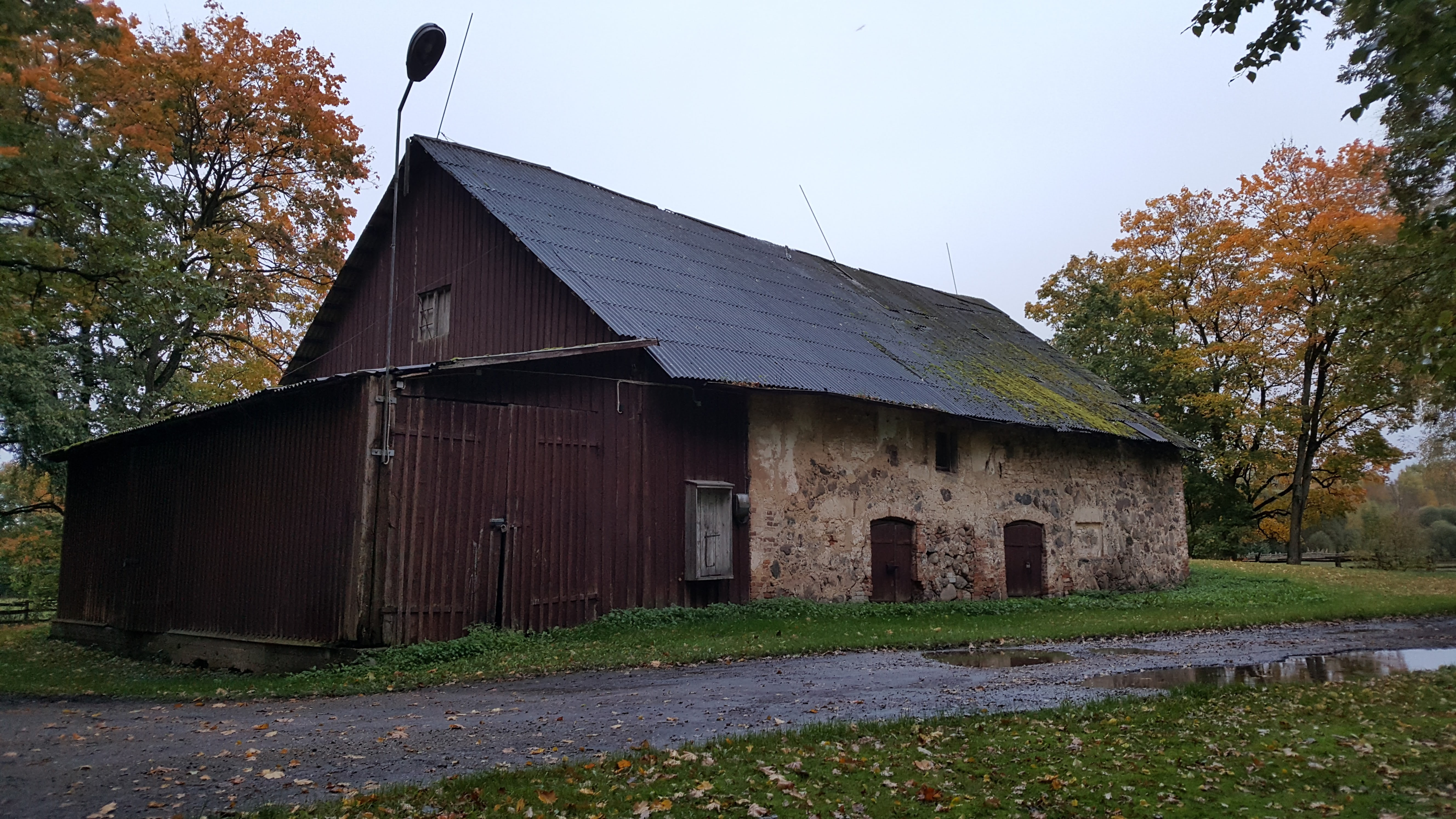 Vorbuse mõisa kõrvalhoone